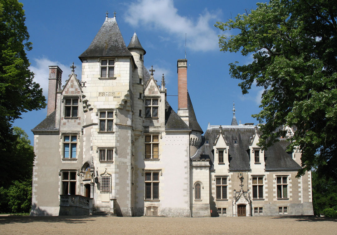 Château de Candé, Monts, Indre-et-Loire, France